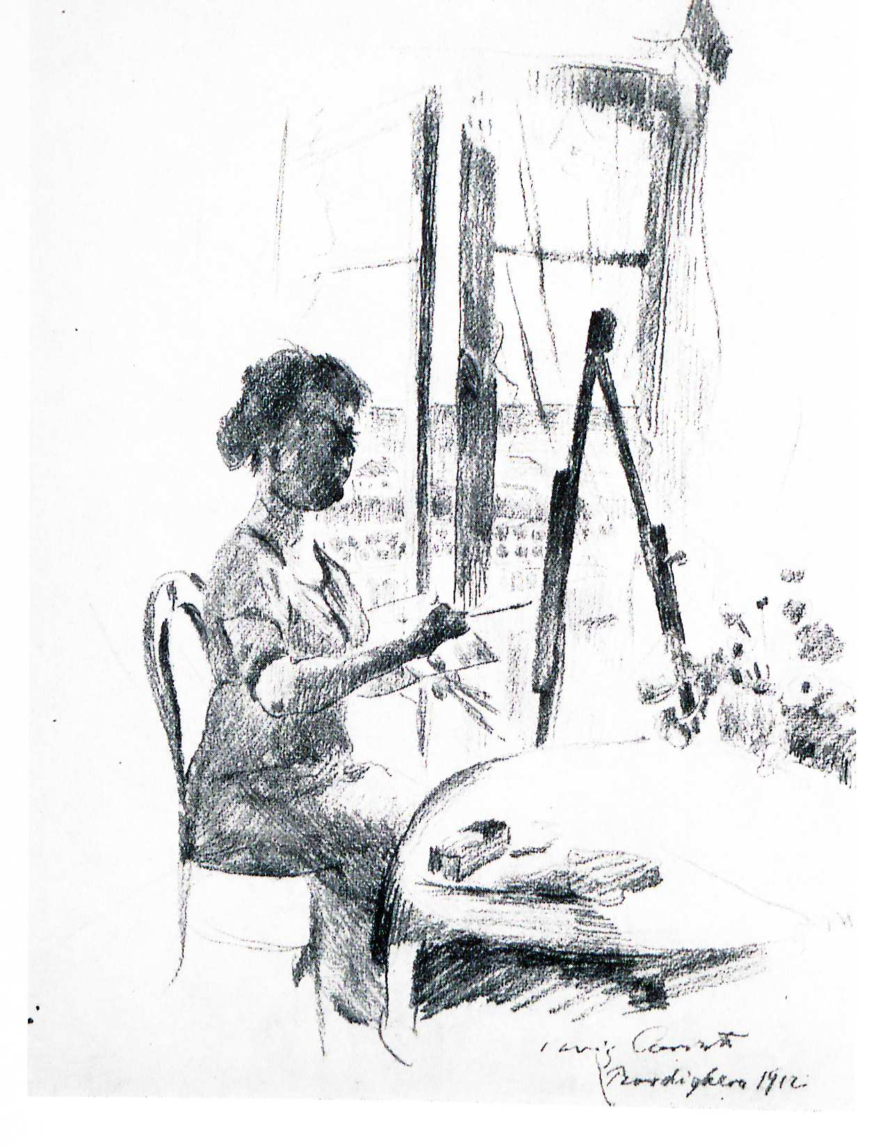 Lovis Corinth Charlotte Berend-Corinth Staffelei 1912 in Bordighera. Blei- und Farbstift 47 x 34,5 cm